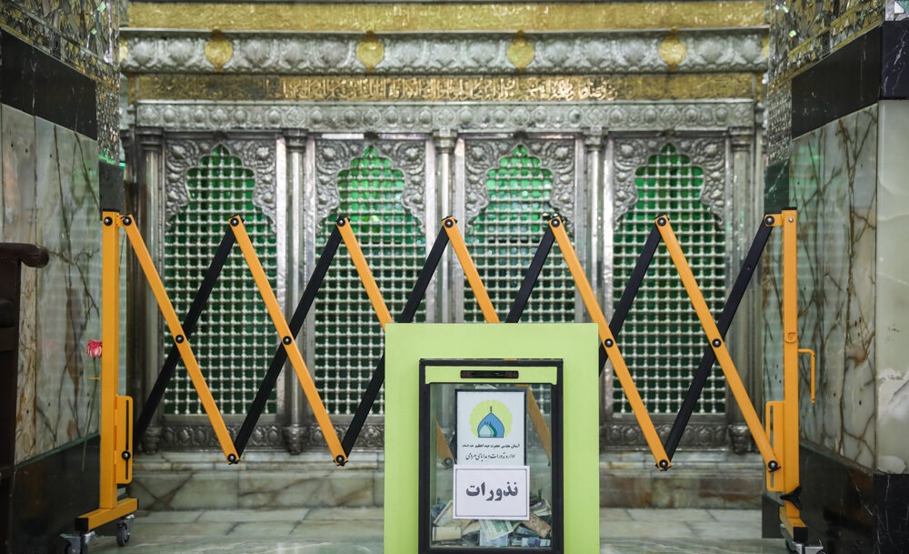 سایه کرونا بر زندگی شهری